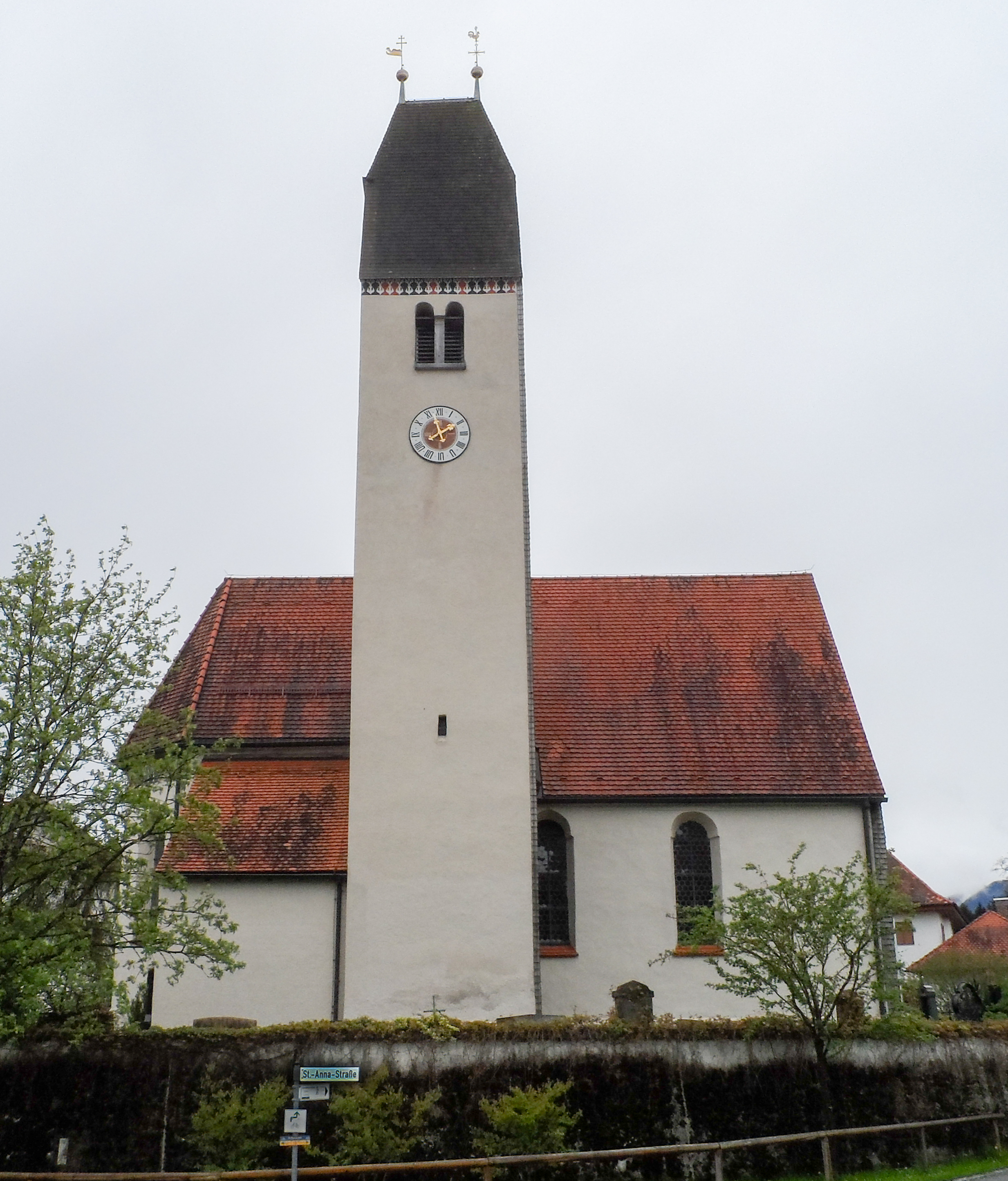 Katholische Filialkirche St. Anna - Schöffau, Uffing am Staffelsee